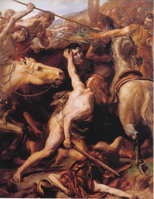 Der Gallier Ducar enthauptet den römischen General Flaminius in der Schlacht am Trasimenischen See